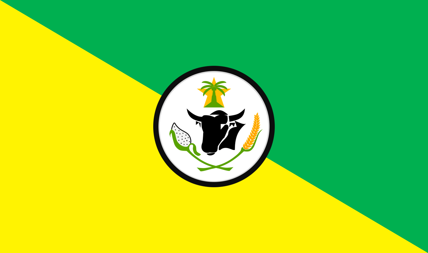 Bandera Villanueva Casanare mejorada en HD